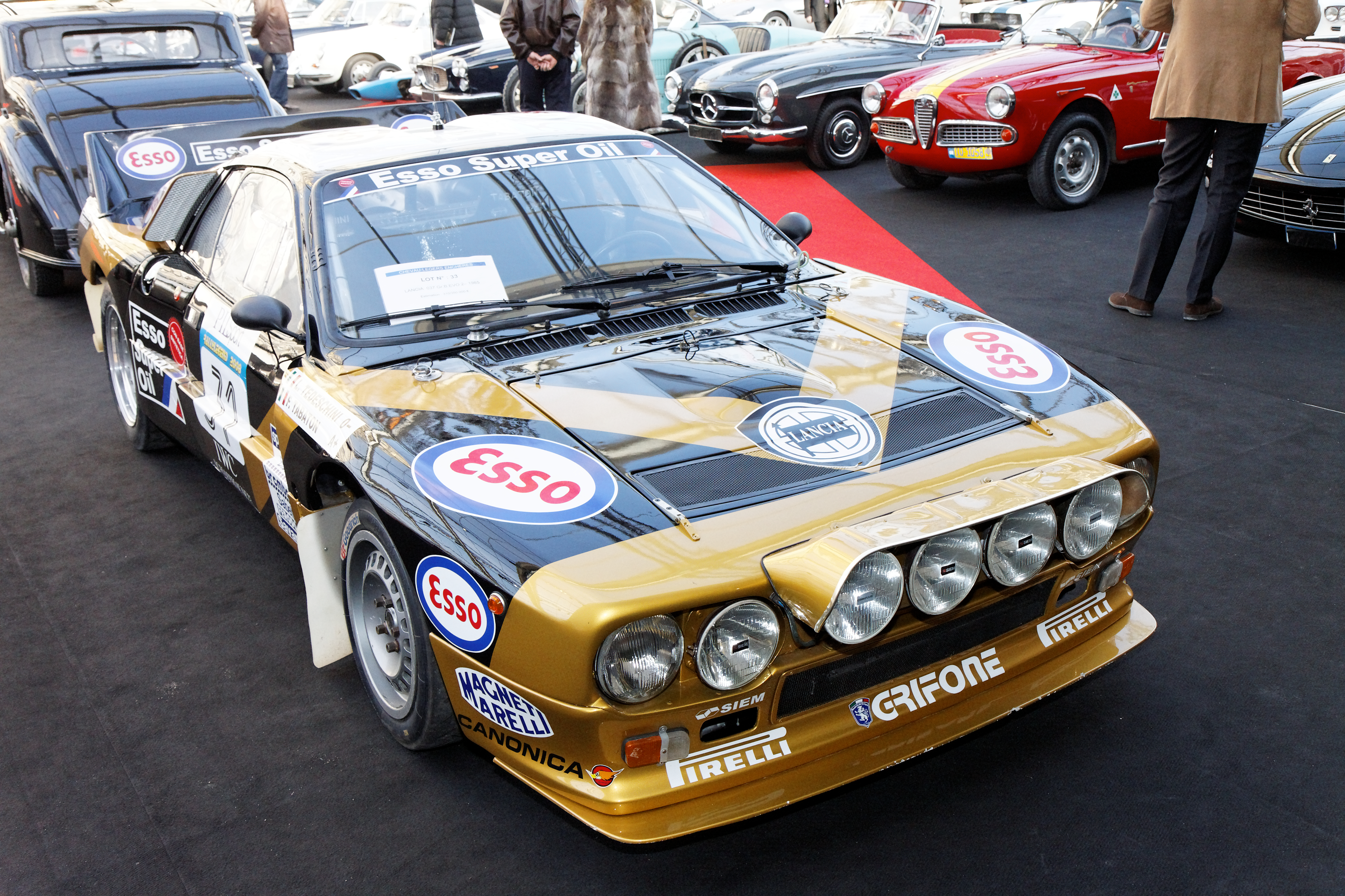 Lancia 037 - Festival Automobile International 2011 - Vente aux enchères